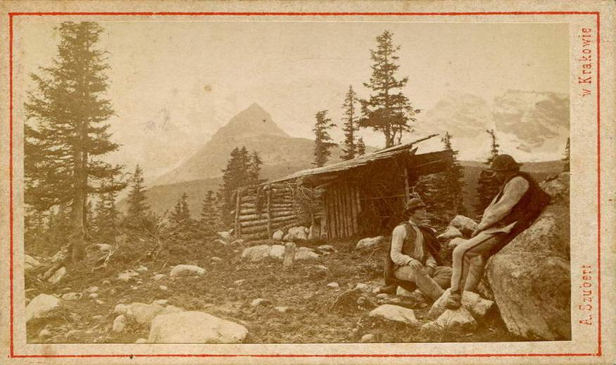 Szałas na Hali Gąsienicowej. W tle Mały Kościelec i Świnica.